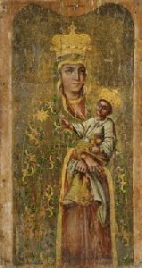 Богоматерь Снежная. 2-я пол. XVIII в. Дер. Острогляды Брагинский р-н Гомельской обл